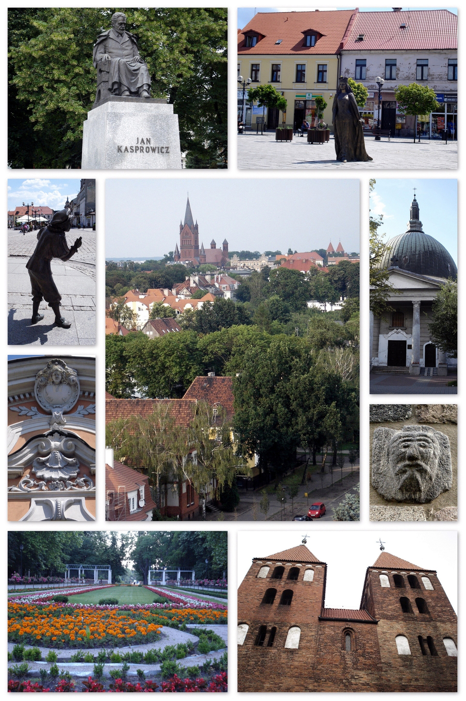 Inowrocław Rzeźba na Rynku, Rzeźba św. Jadwigi, pomnik Jana Kasprowicza, Park Solanki, Panorama miasta, Rzeźba-maska na elewacji Kościoła NMP, kamienica na Starym Mieście, Kościół p.w. NMP, Kościół Garnizonowy